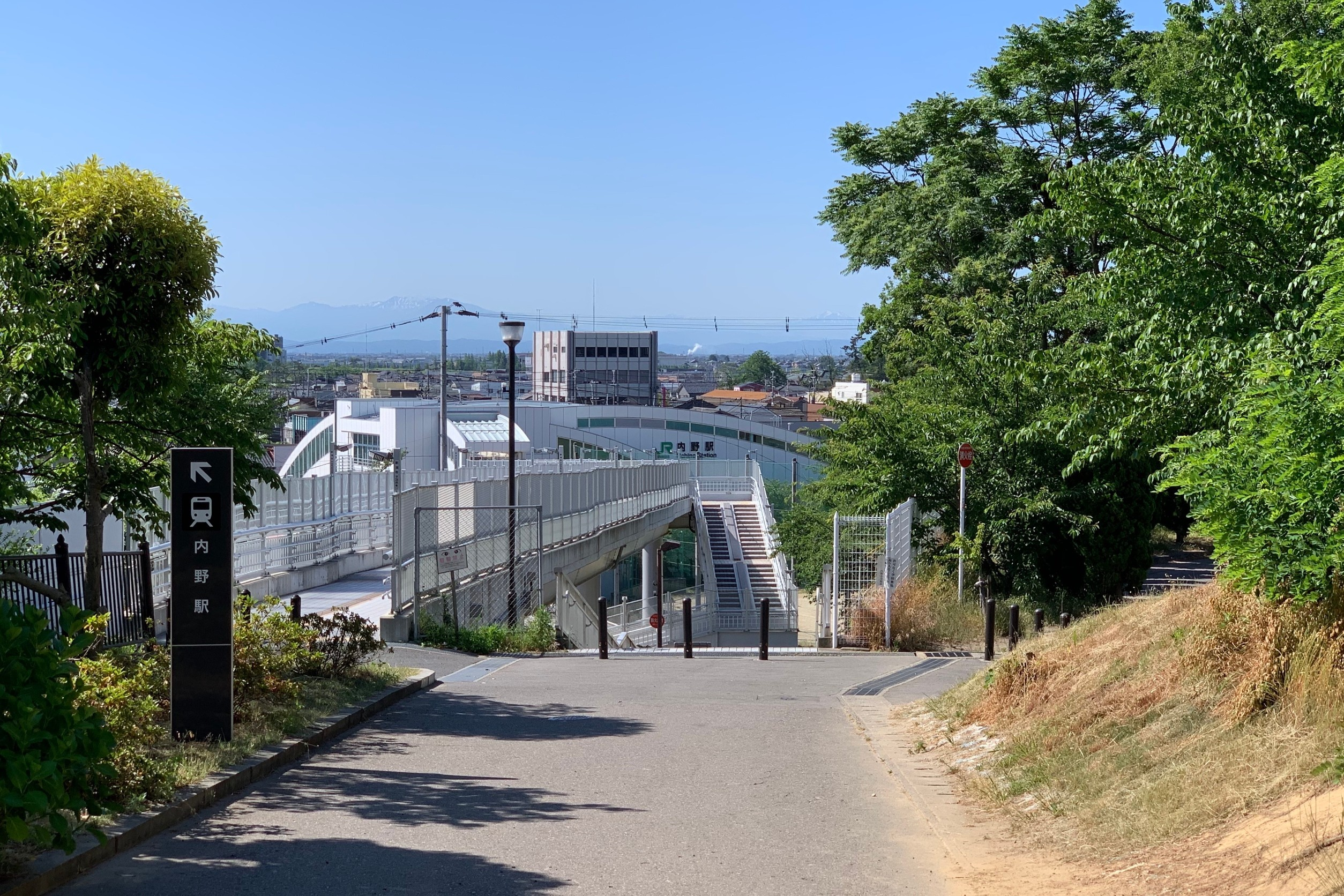 内野駅北口の「内野さくらロード」（新潟市西区，2020年6月）新潟砂丘から見下ろした風景。